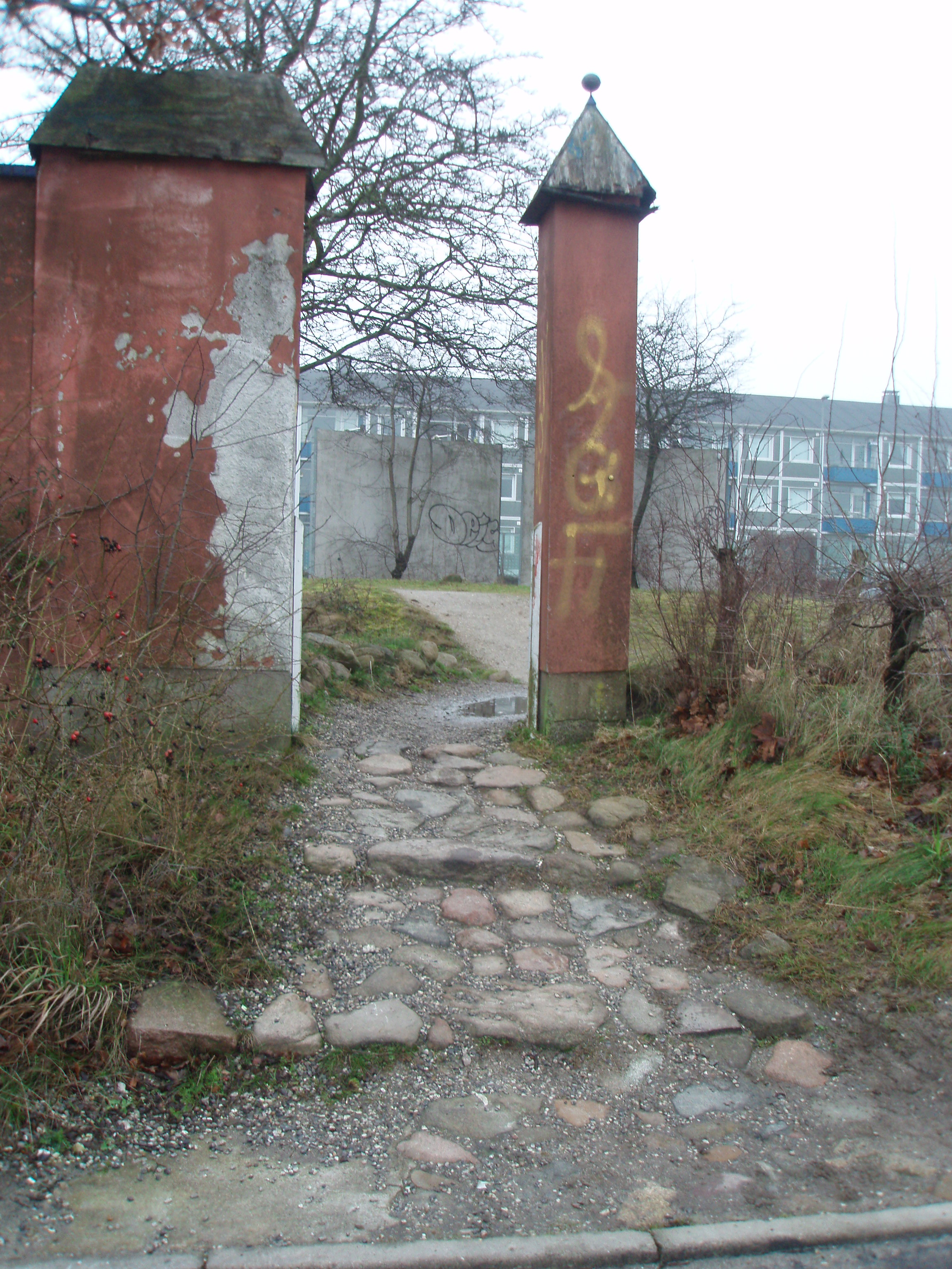 "Indgangen" til området.